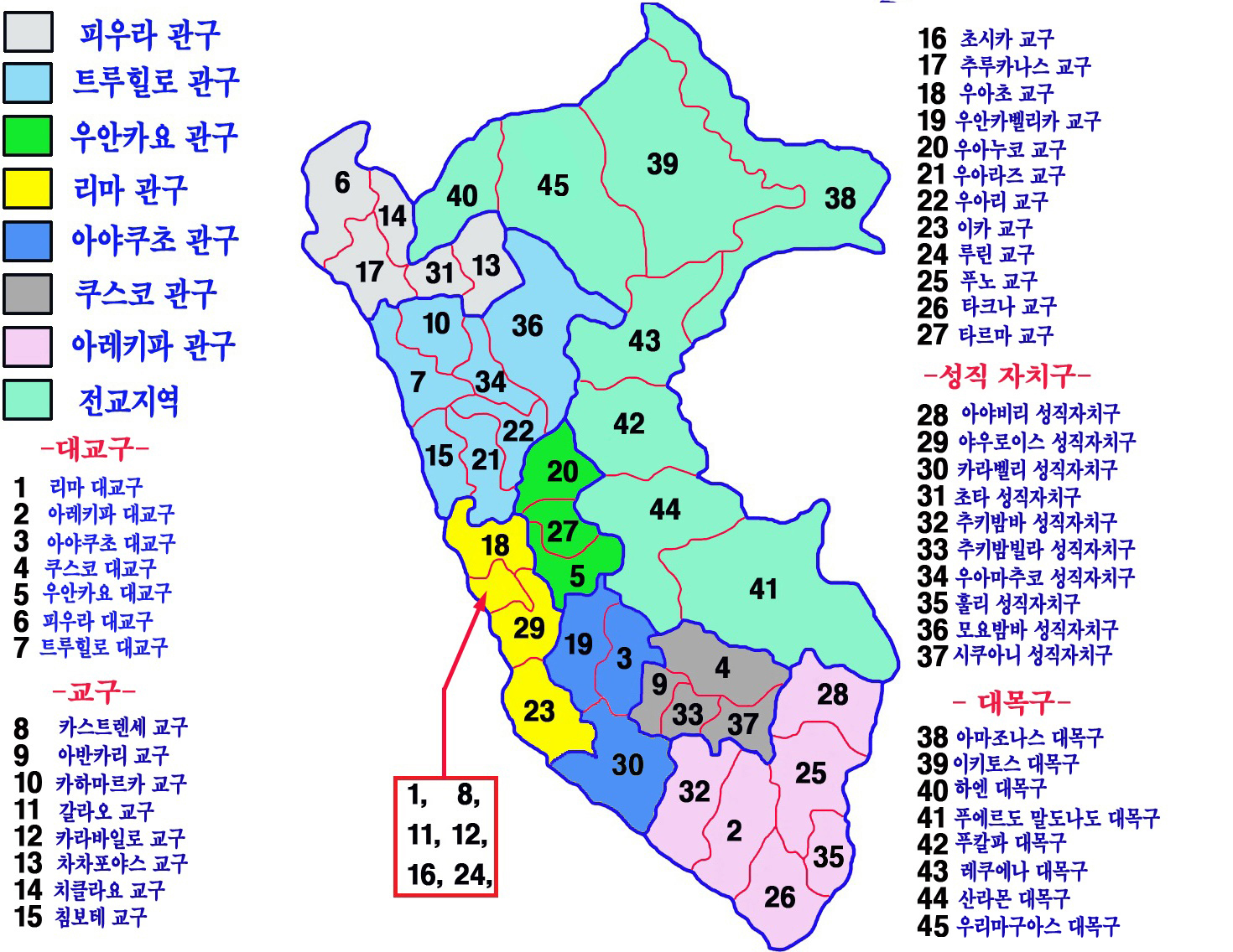 페루의 가톨릭 교구도